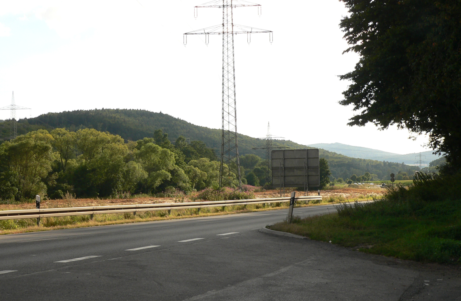 Die B 3 an der Schwalmpforte östlich von Kerstenhausen; links der Kuhberg